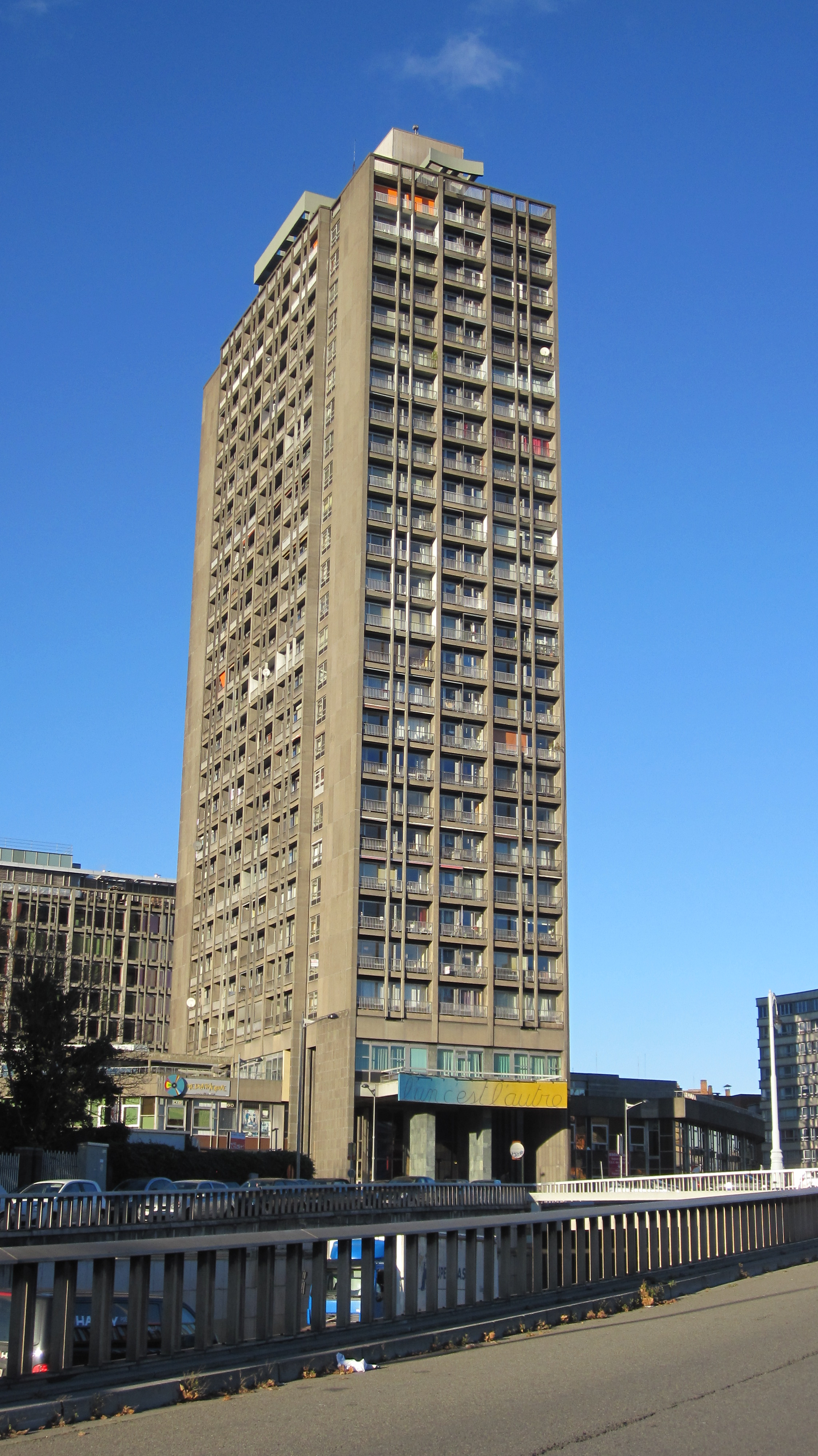 Tour Kennedy